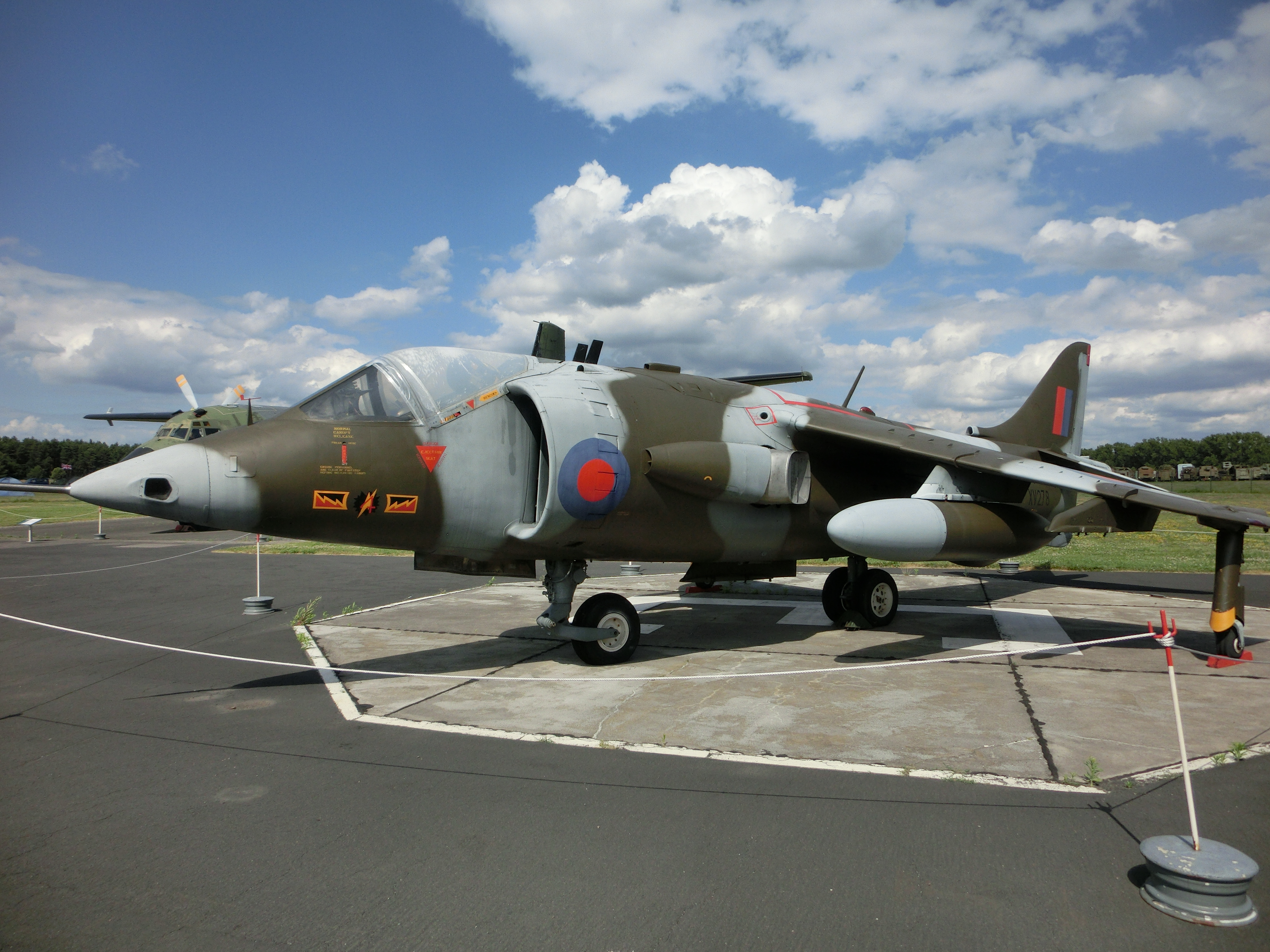 Hawker Siddeley P-1127 Harrier